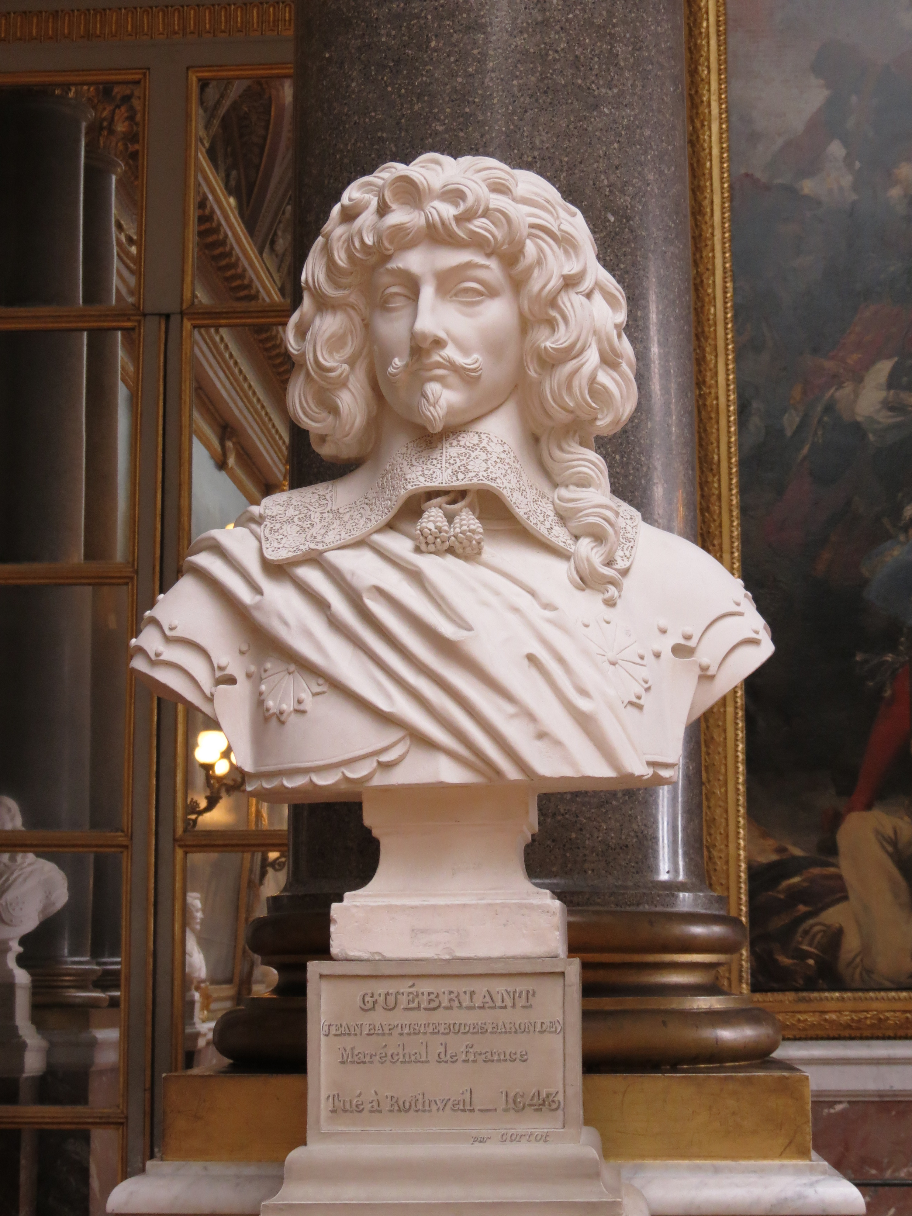 Jean-Pierre Cortot, Jean Baptiste Budes, comte de Guebriant, maréchal de France (1602-1643), 1838, buste en plâtre, Versailles, château de Versailles, galerie des Batailles.